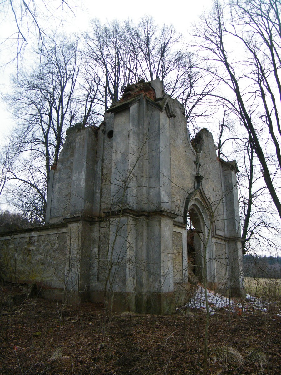 Kaple svatého Jana Křtitele v Liščím